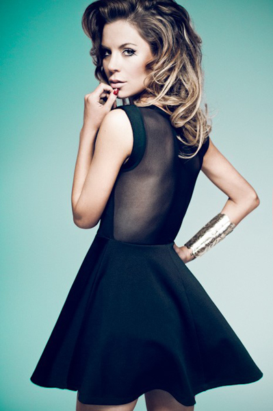 Natalia Lesz